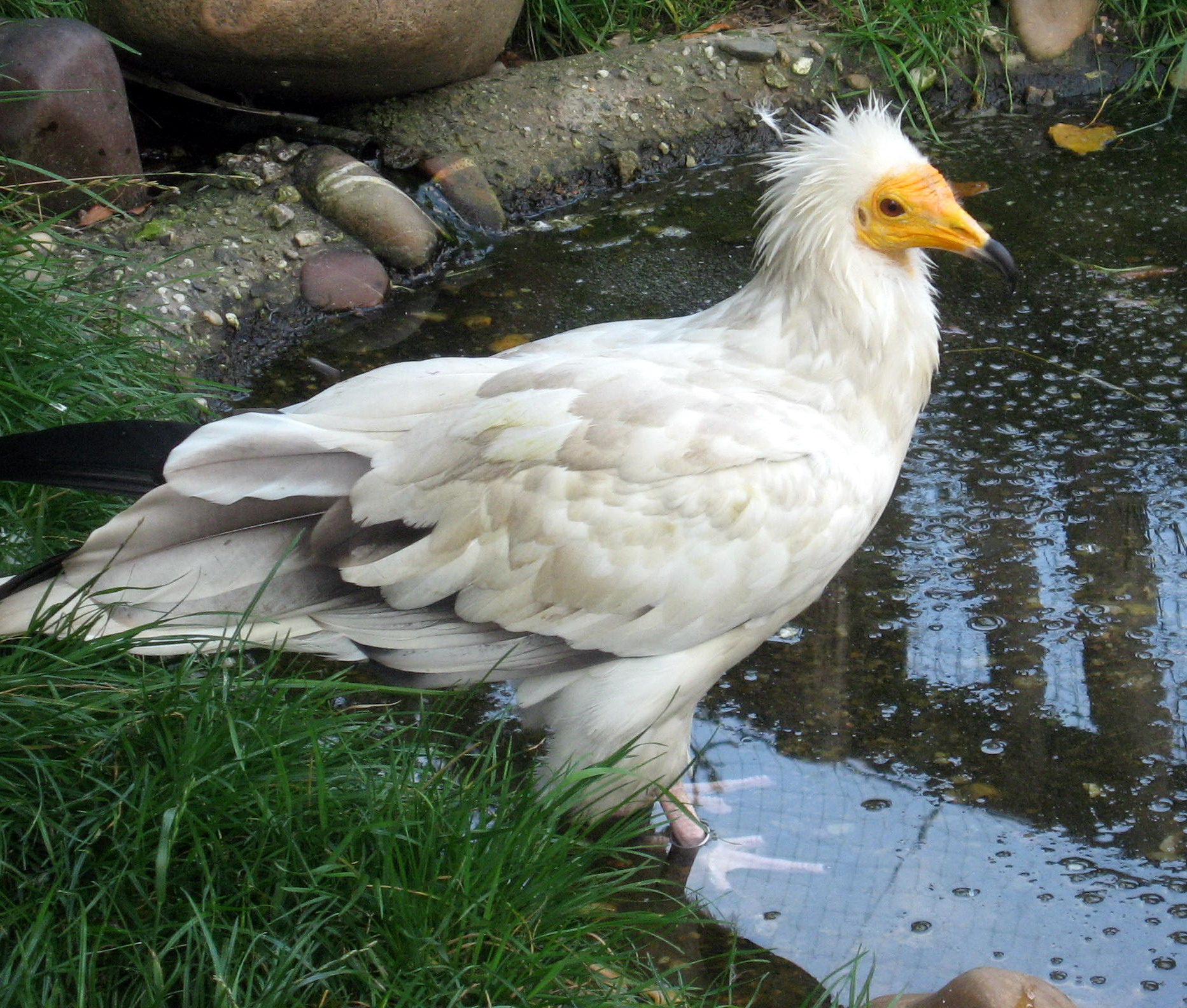 Sup mrchožravýLatina: Neophron percnopterus